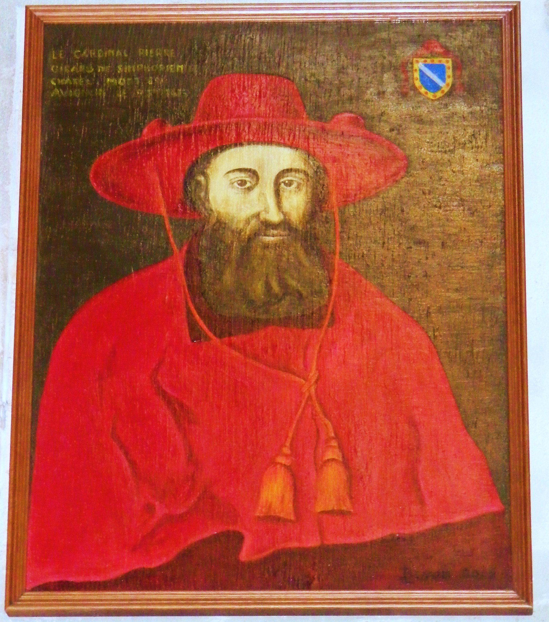 Portrait du Cardinal Girard